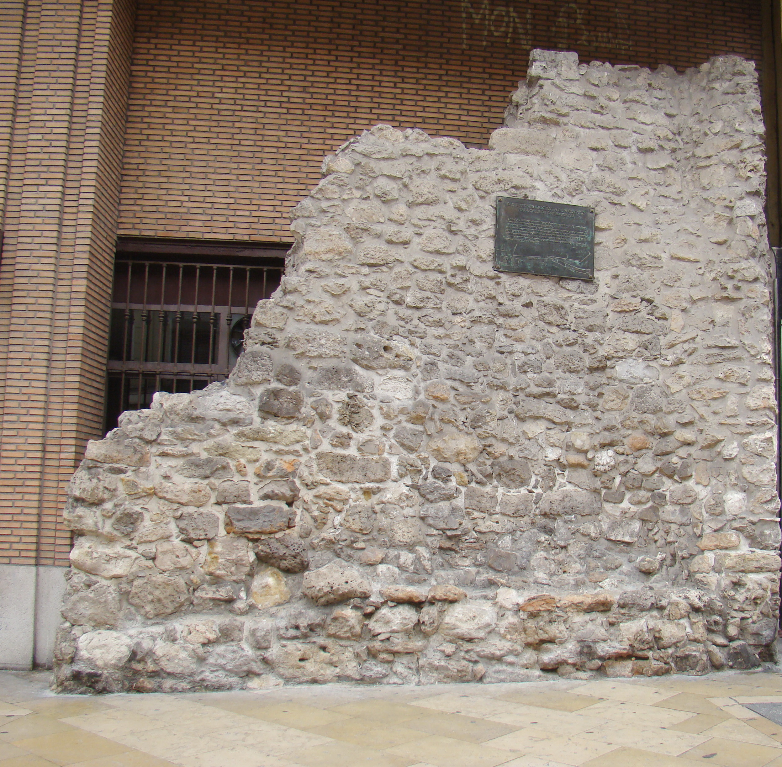 Valladolid, España. Vestigios de la muralla del siglo XII-XIII en la calle de las Angustias entre la calle del Bao y la que va a la plaza del Rosario.